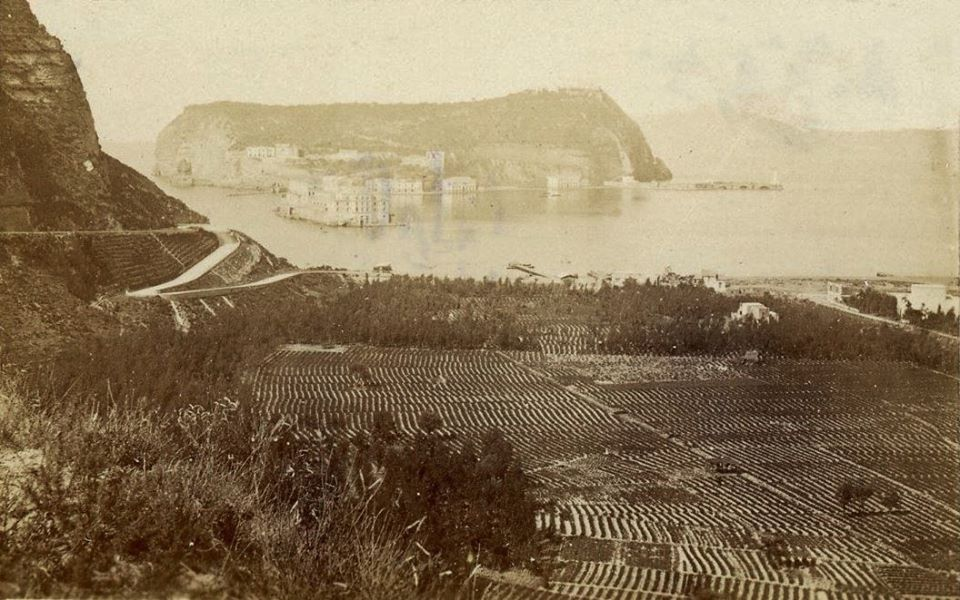 Napoli - Isola di Nisida. Giorgio Sommer, catalogo numero 2299.